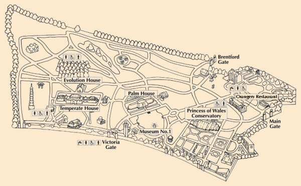 Kew Gardens Map